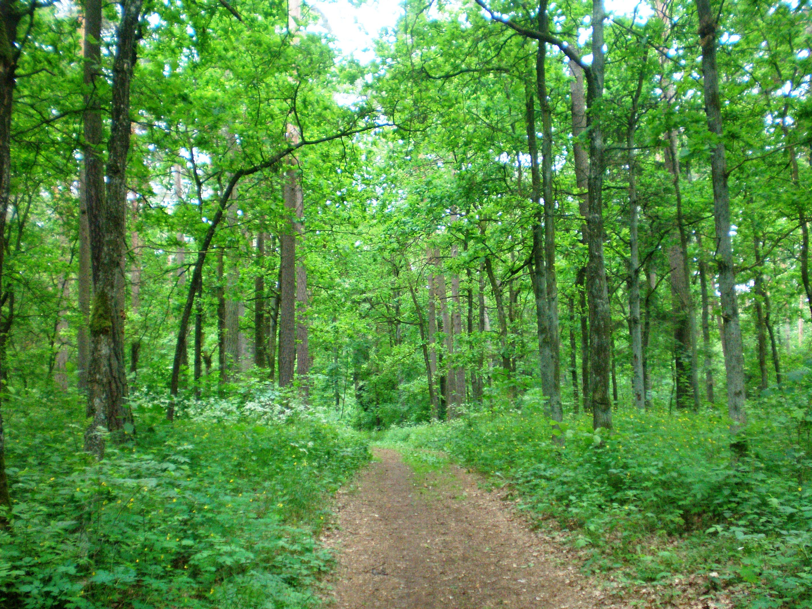 Babėnų miškas